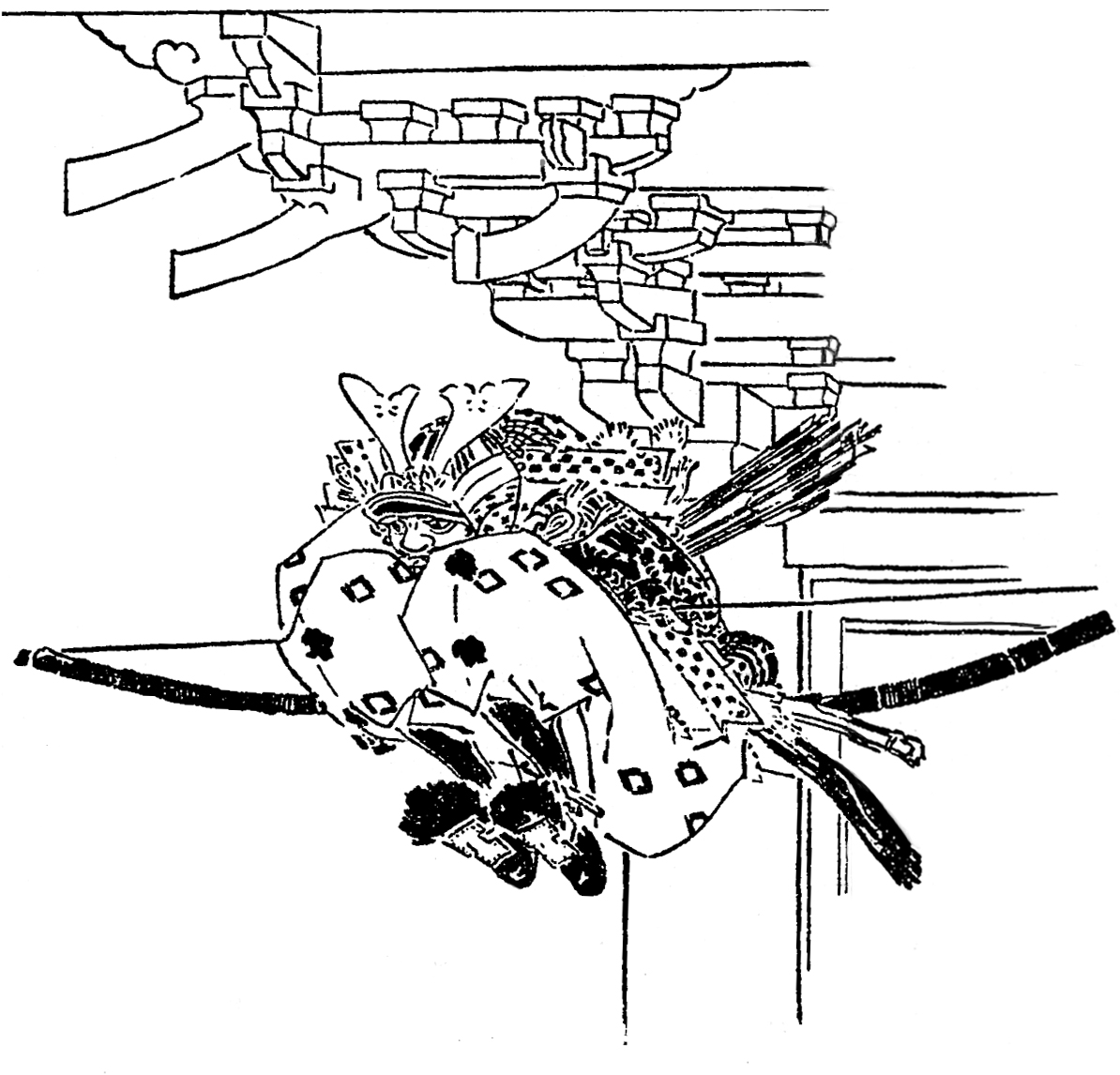 佐藤忠信。源義経の郎党。平安時代末期 - 鎌倉時代初期の武将。／江戸時代『前賢故実』より。画：菊池容斎